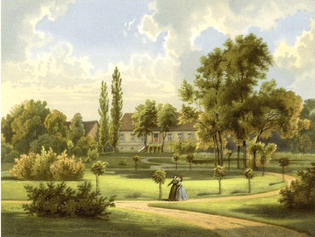 Rittergut Rengerslage, Kreis Osterburg, Provinz Brandenburg